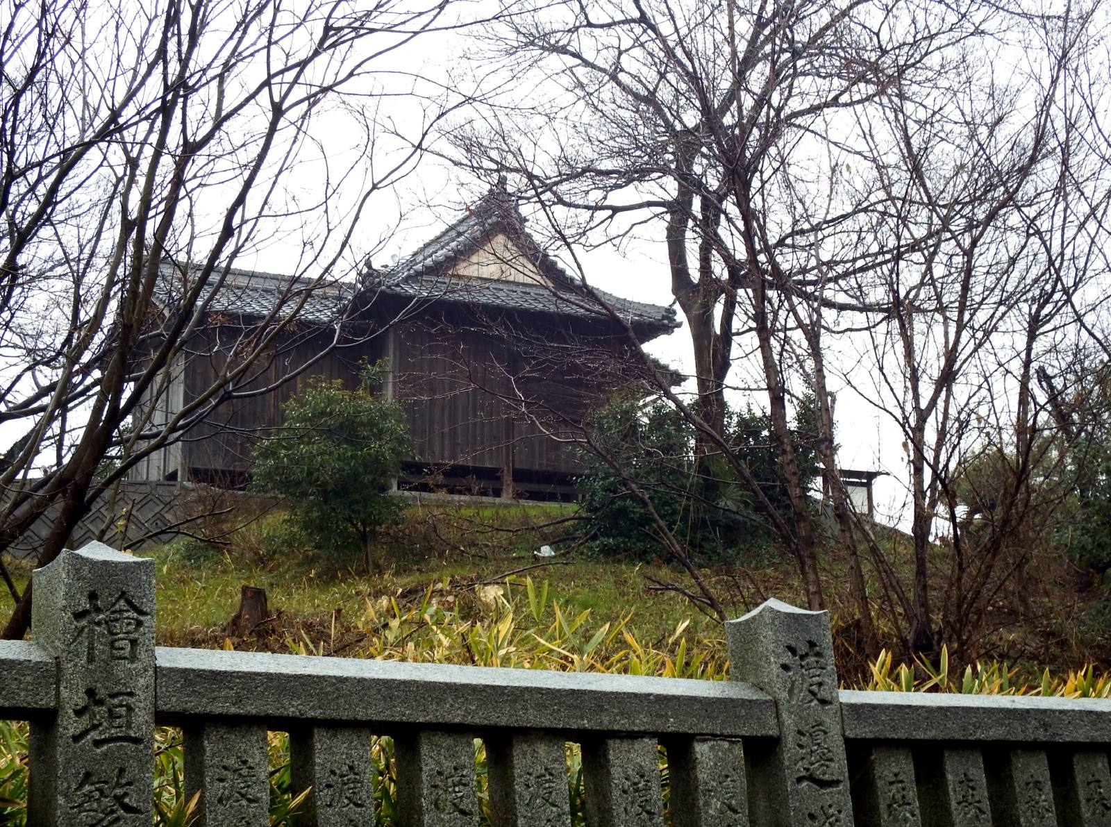 衣干八幡神社